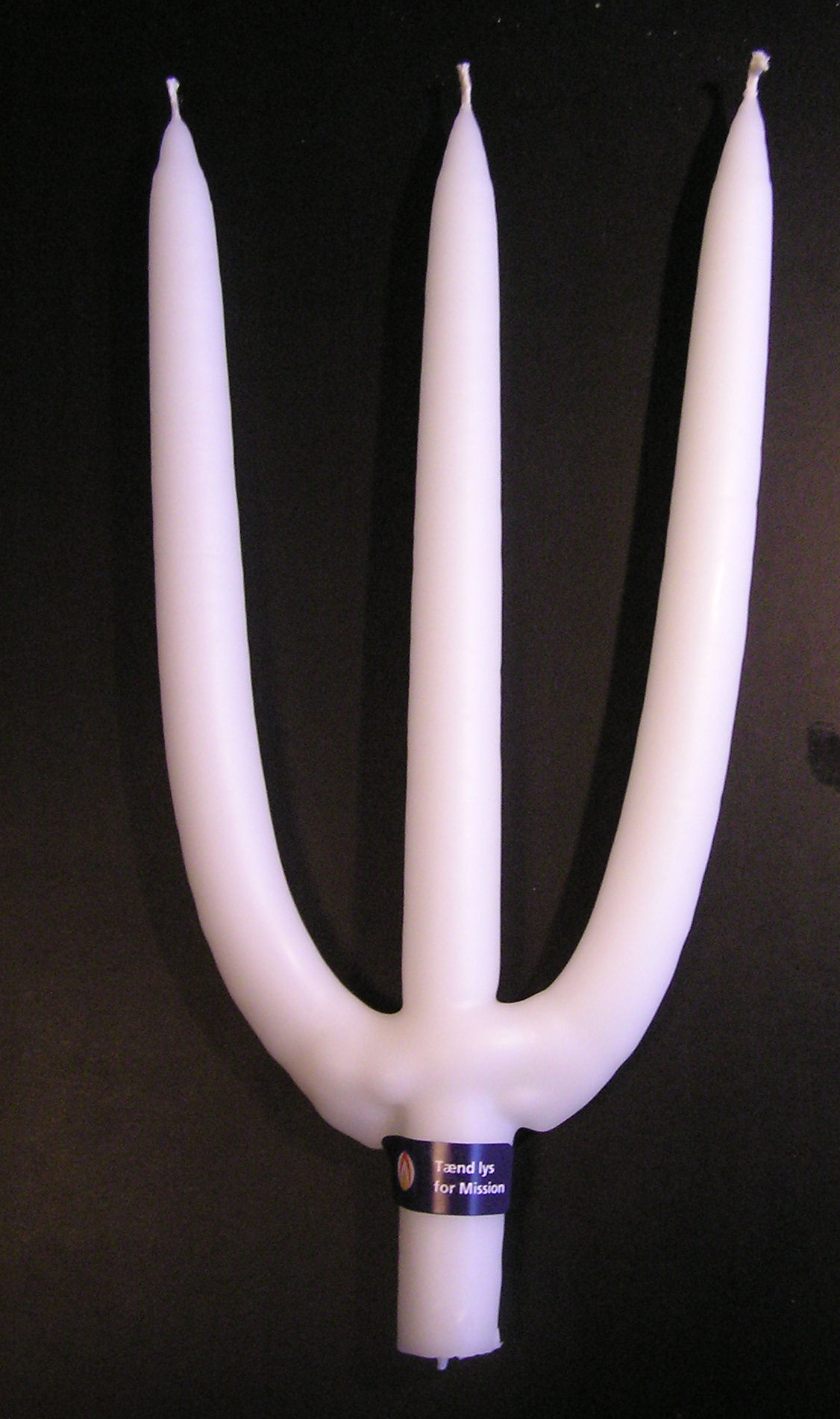 Helligtrekongeslys,Epiphany candle